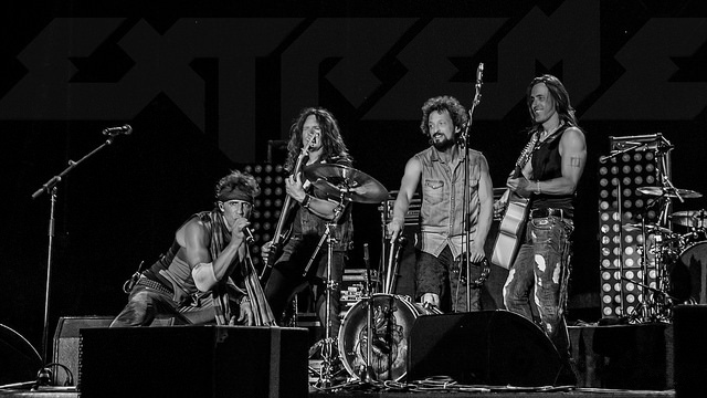 Extreme en festival Garage Sound Fest (Madrid), en 2017